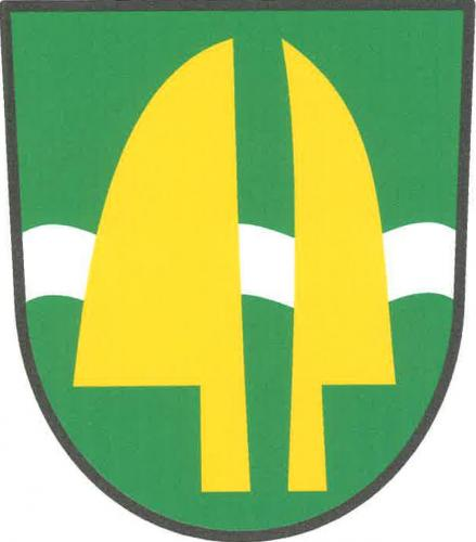 Záblatí (okres Žďár nad Sázavou), znak obce